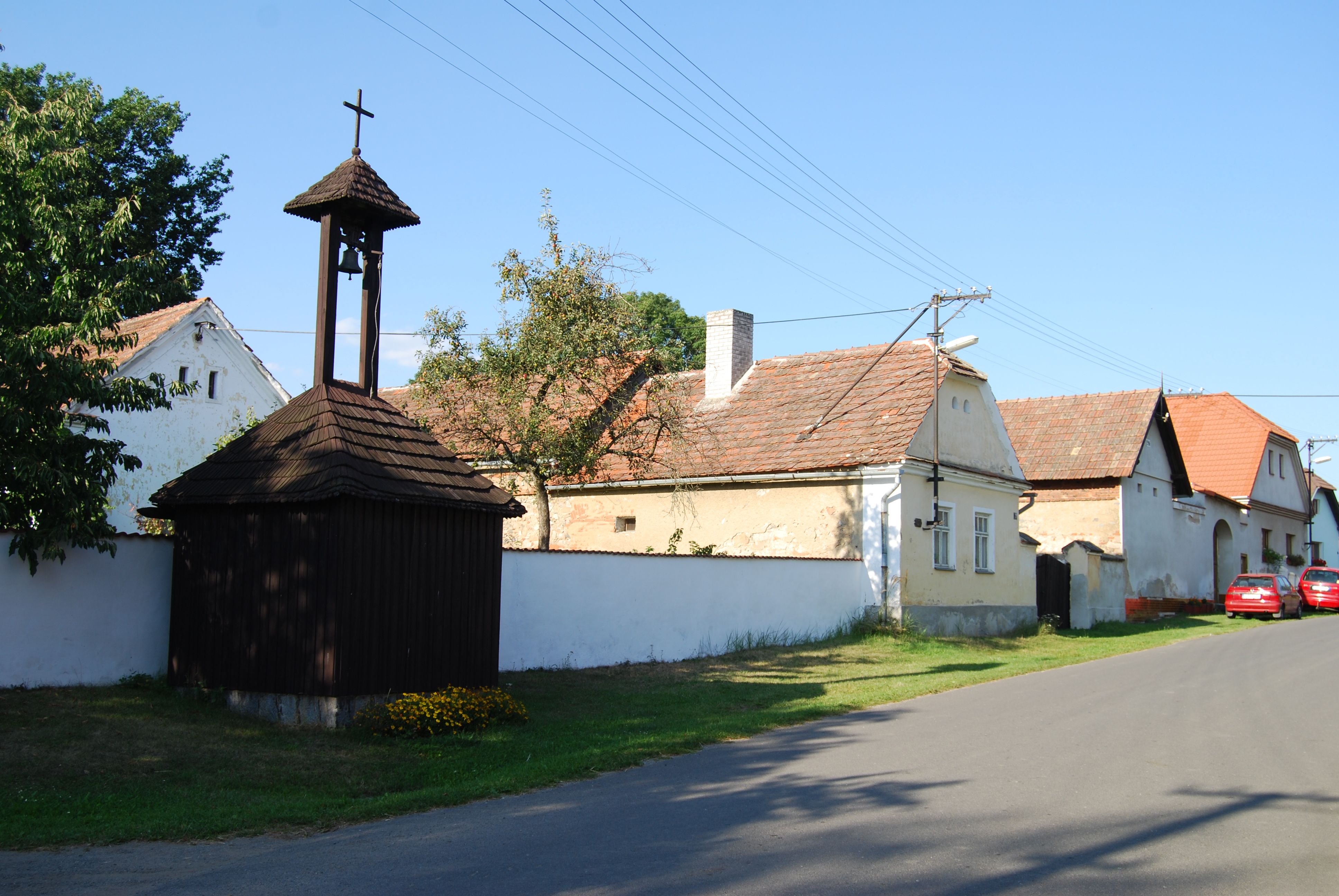 Dřevěná zvonice v obci. Šerkov je část obce Lety v okrese Písek. Česká republika.